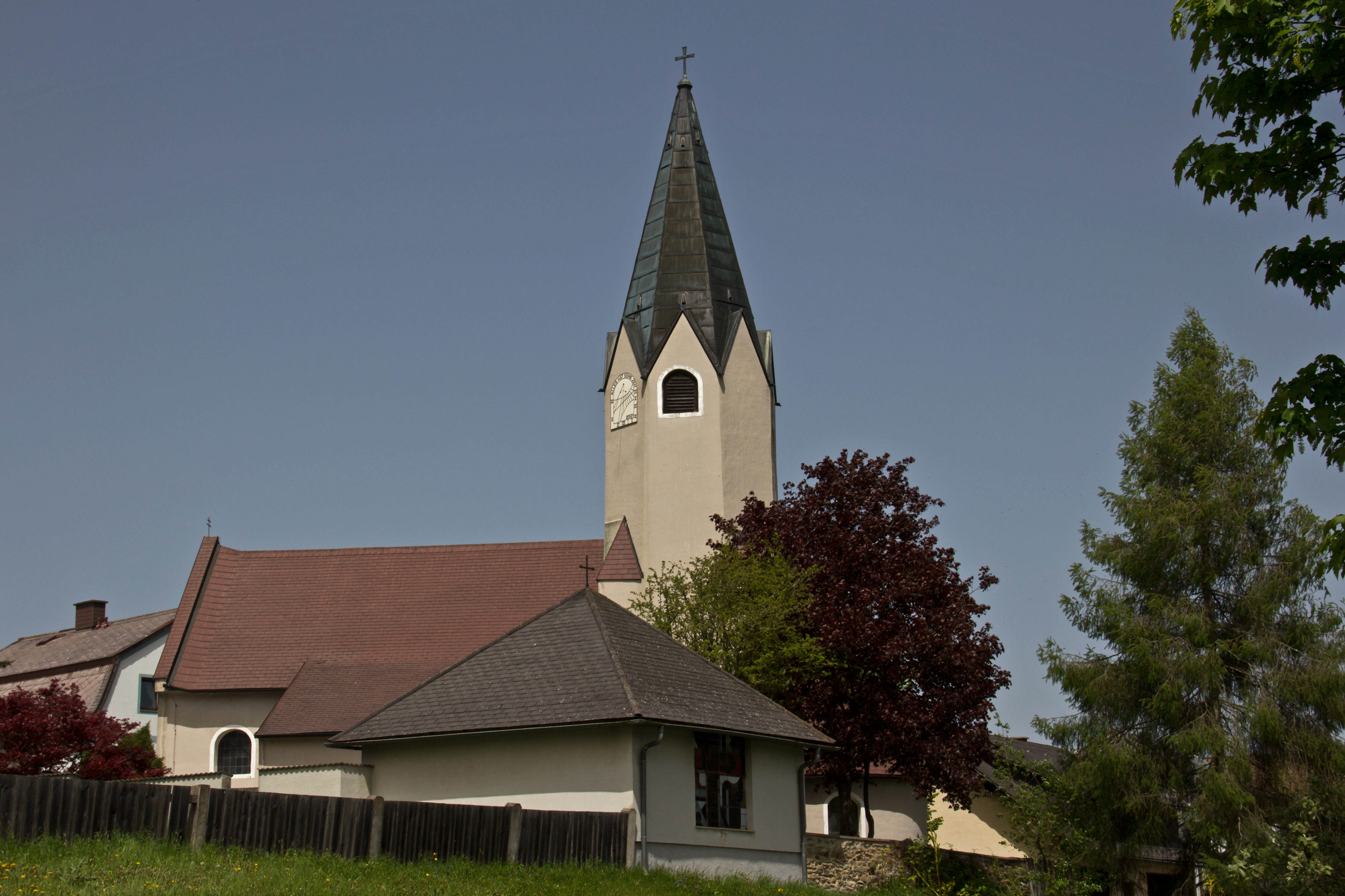 Kath. Pfarrkirche hl. Nikolaus 1436 urkundlich erwähnt. Romanischer Bau mit Rundapsis und gotischem Südturm. Im Jahr 1756 barockisiert.